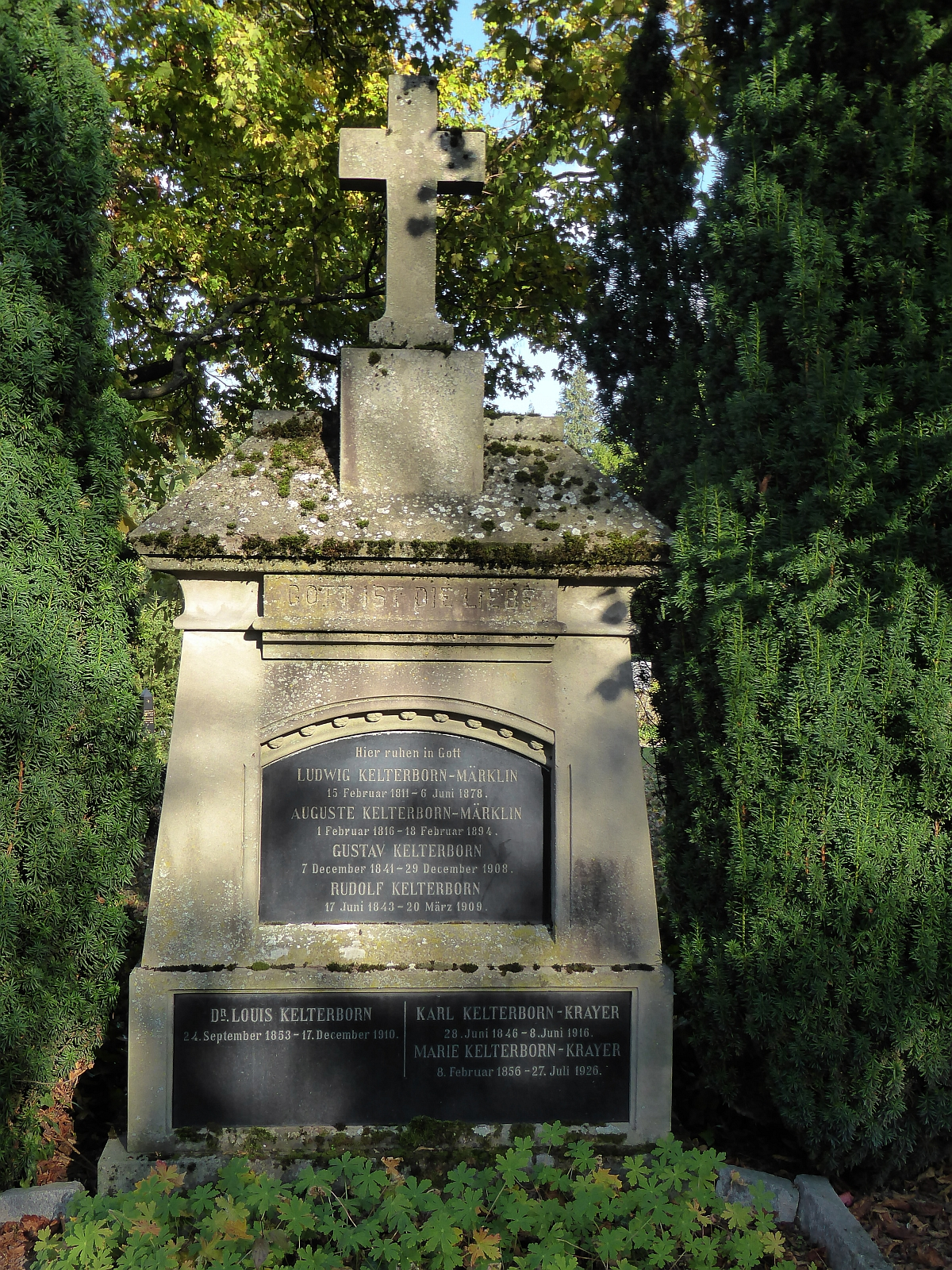 Gustav Kelterborn (1841–1908) Architekt, Grab auf dem Friedhof Wolfgottesacker, Basel